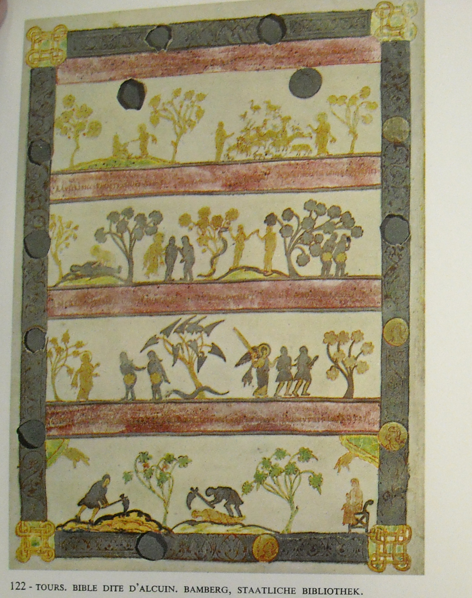 Сюжет из Ветхого завета: сотворение Адама и Евы,первородный грех, изгнание из Рая. Иллюстрация к Генезису Евангелия из Бамберга (Евангелия Алкуина), кон.VIII - нач. IX века.